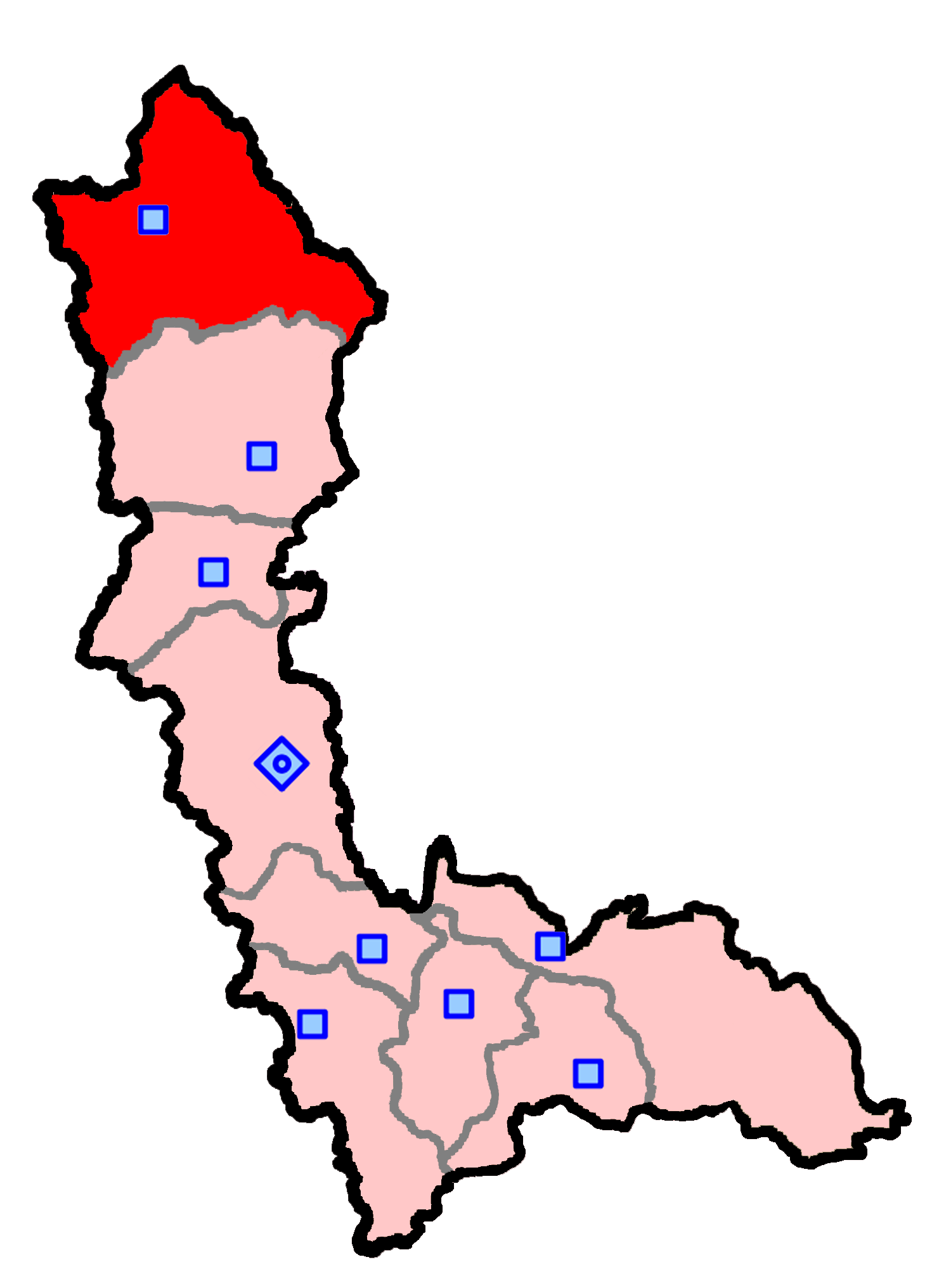 حوزهٔ انتخاباتی ماکو و چالدران و پلدشت و شوط برای انتخابات مجلس شورای اسلامی